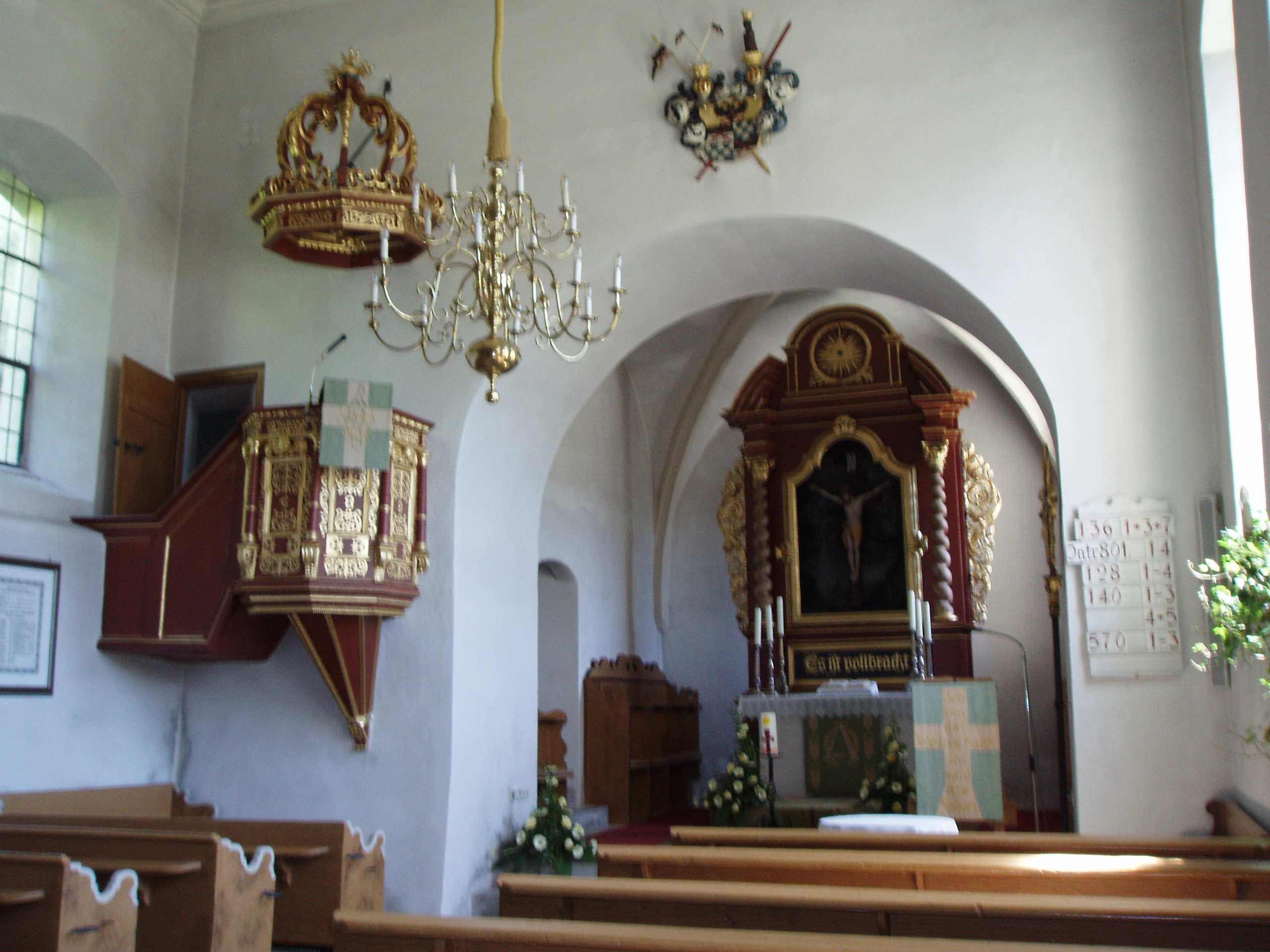 Suffersheim, Kirche St. Michael, innen